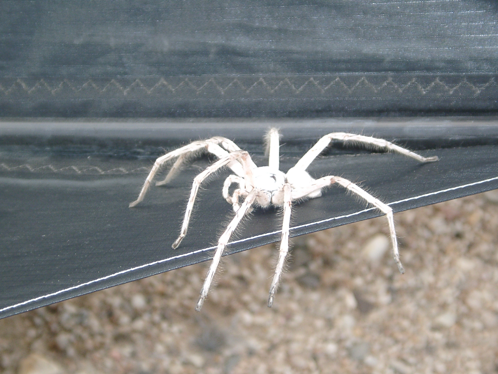 Spinne White Lady aus Namibia Diese Datei wurde unter den Bedingungen der „Creative Commons Namensnennung-Weitergabe unter gleichen Bedingungen Deutschland“-Lizenz (abgekürzt „cc-by-sa“) in der Version 2.0 veröffentlicht.